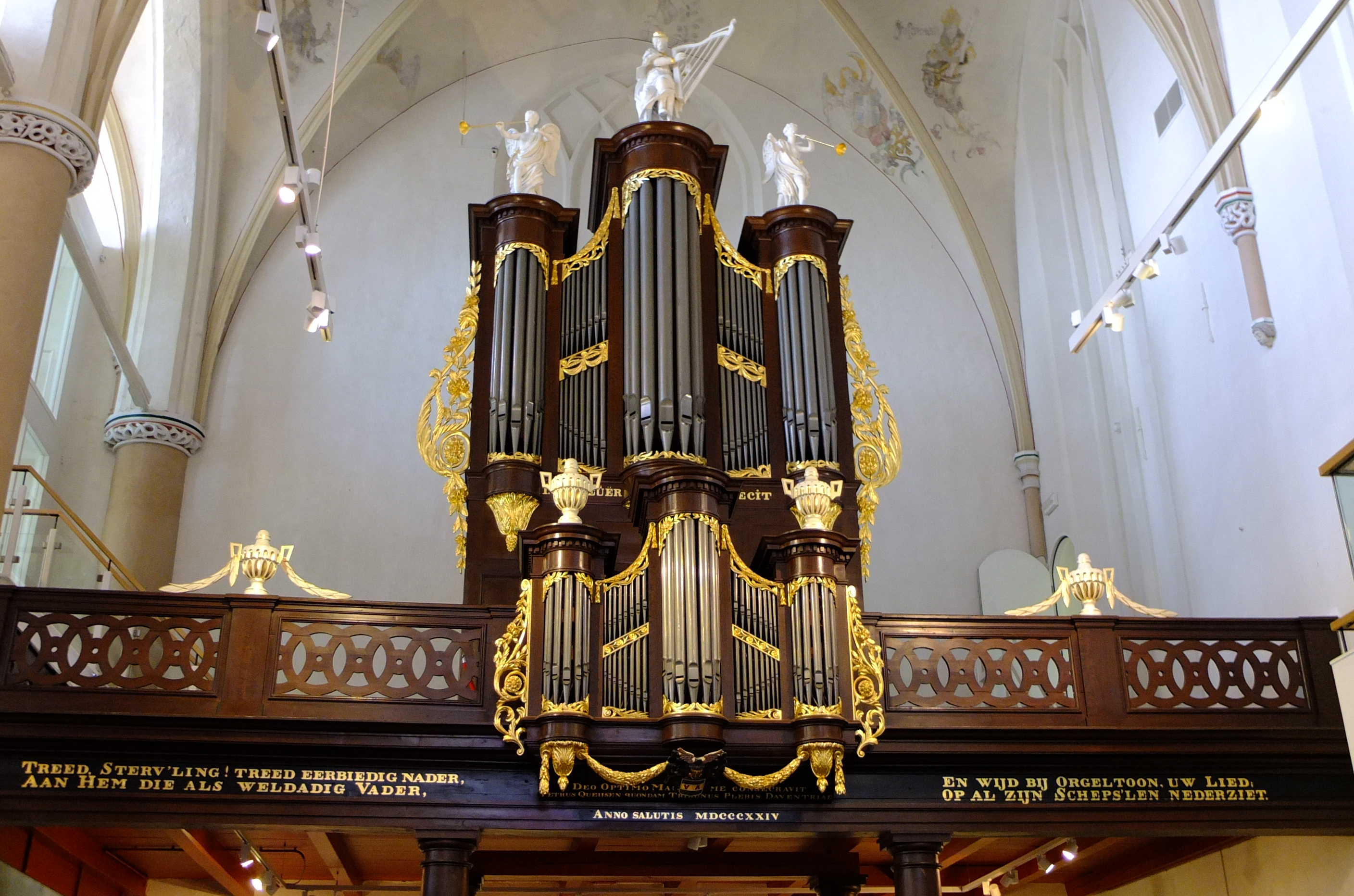 Waanders in de Broeren in het centrum van Zwolle in de Broerenkerk